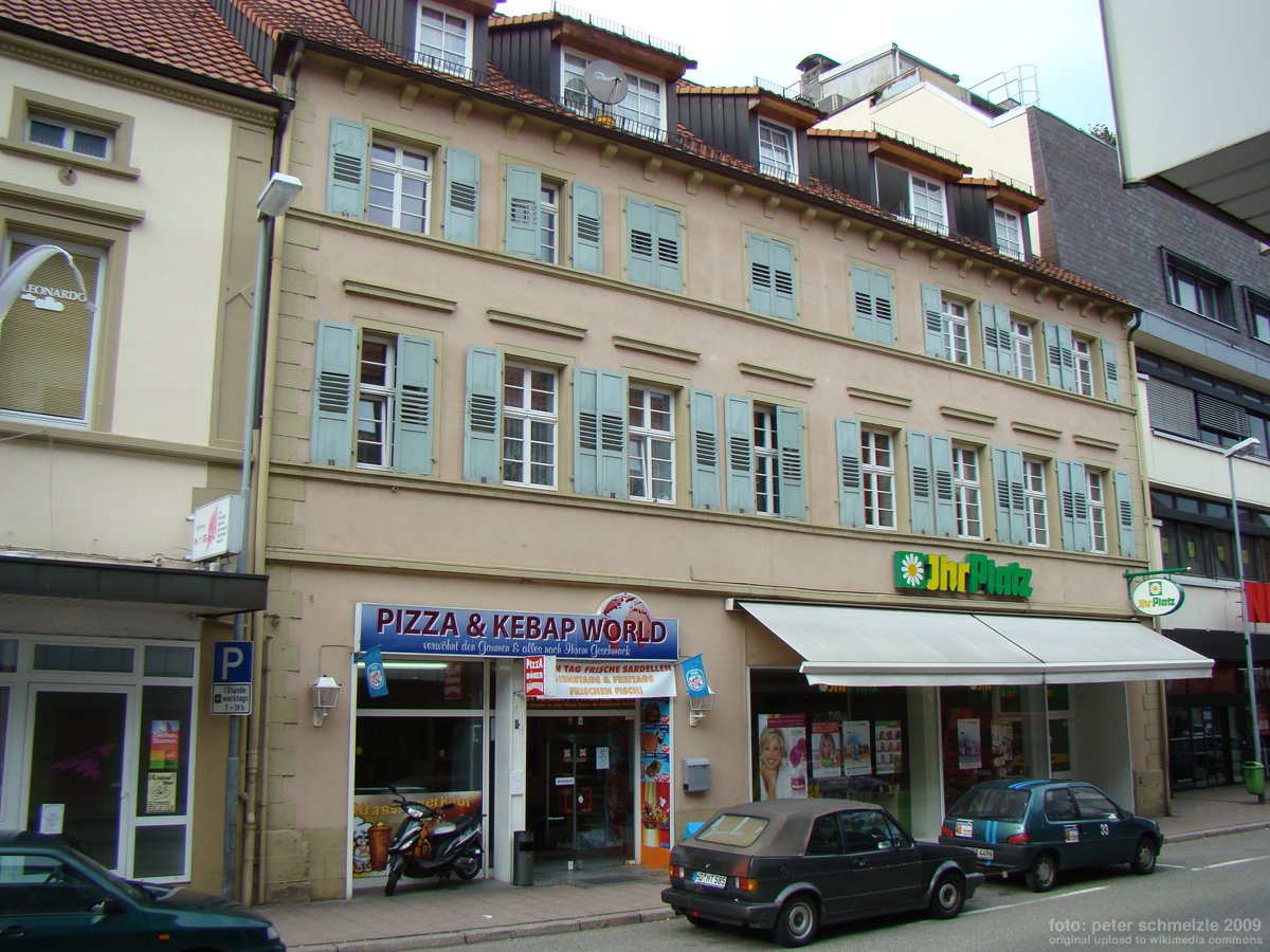 Historisches Gebäude Brettener Straße 14-16 in Eppingen